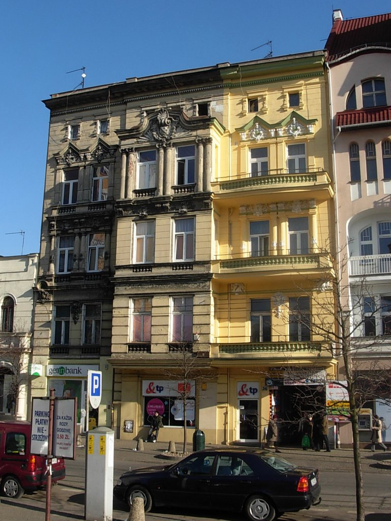 Kamienica ul. Gdańska 36 w Bydgoszczy